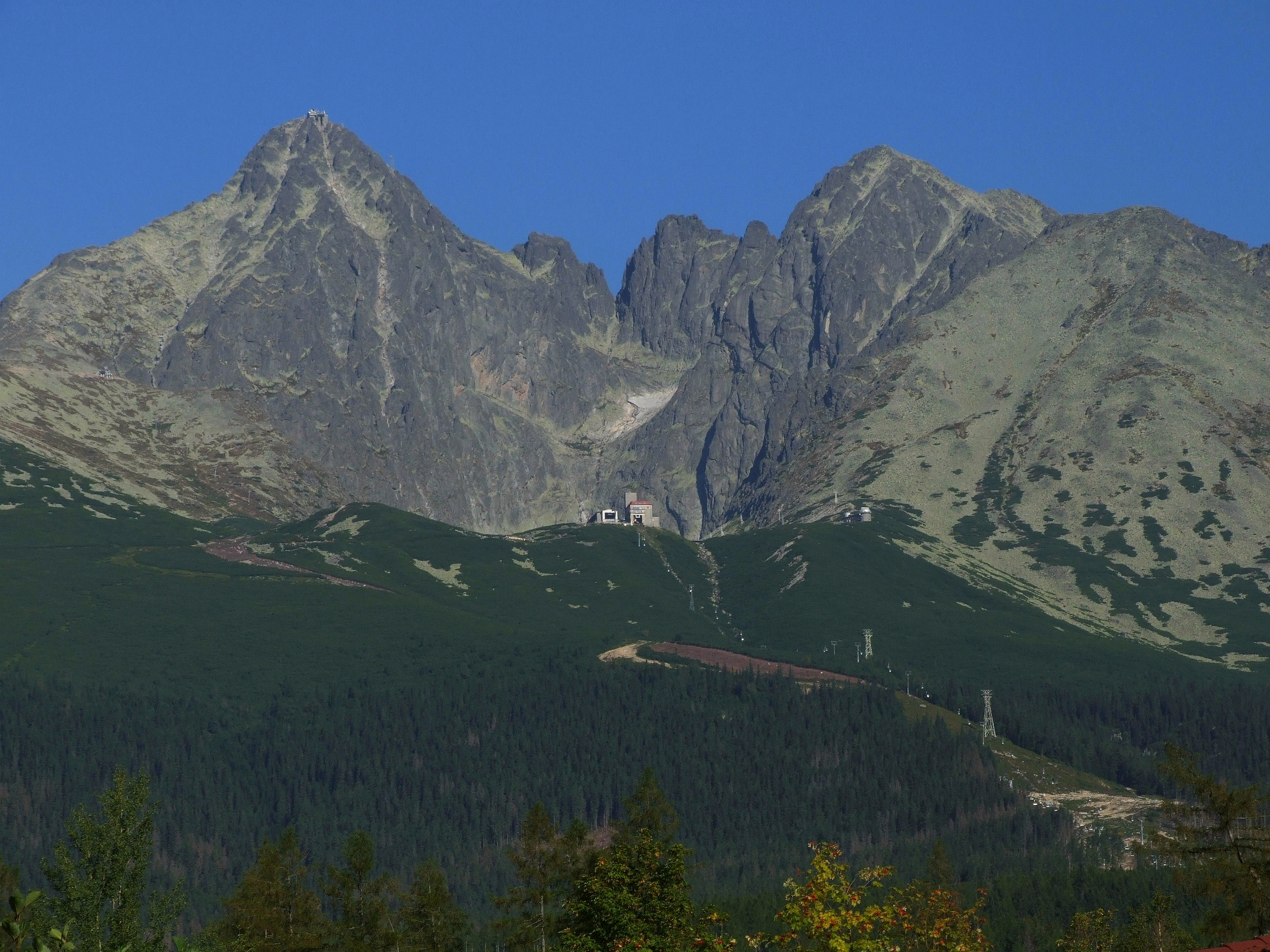 Łomnica, Kieżmarski Szczyt i Huncowski Szczyt, widok od południowo-wschodniej strony